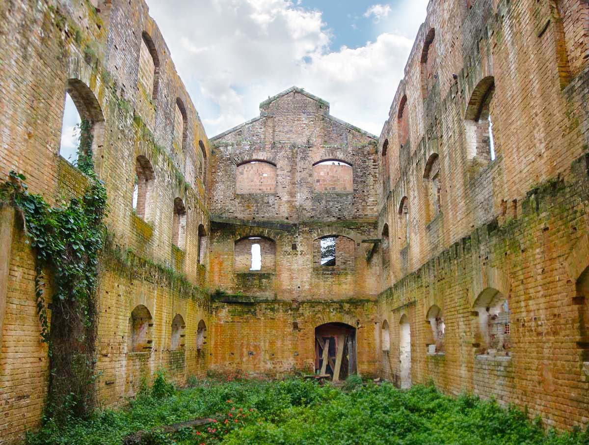 Ruínas das Indústrias Reunidas Francisco Matarazzo (IRFM) em Iguape (SP). A filial das Indústrias Reunidas, foi instalada em 1921, porém após a abertura do Canal do Valo Grande, o Mar Pequeno acabou assoreando. Poucos anos depois, o porto marítimo da cidade já não podia ser utilizado por embarcações de maior calado, impedindo assim a saída do arroz por aquele porto e levando à virtual destruição da cultura de arroz da cidade. A Matarazzo acumulou então prejuízos sucessivos por uma década, até que decidiu fechar sua filial em 1935, abandonando todas as suas máquinas e equipamentos.